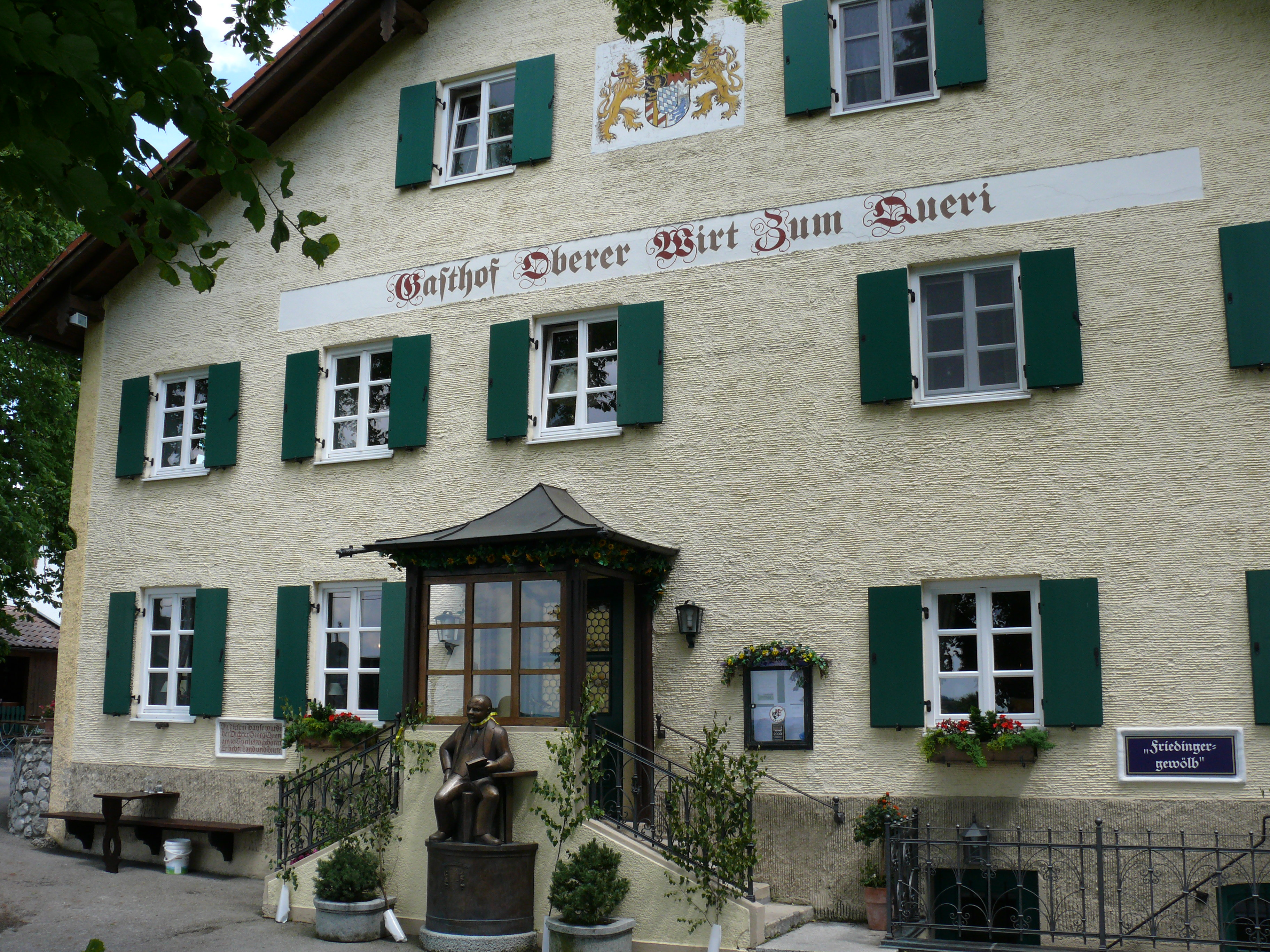 House of Birth of Queri in Frieding near Andechs